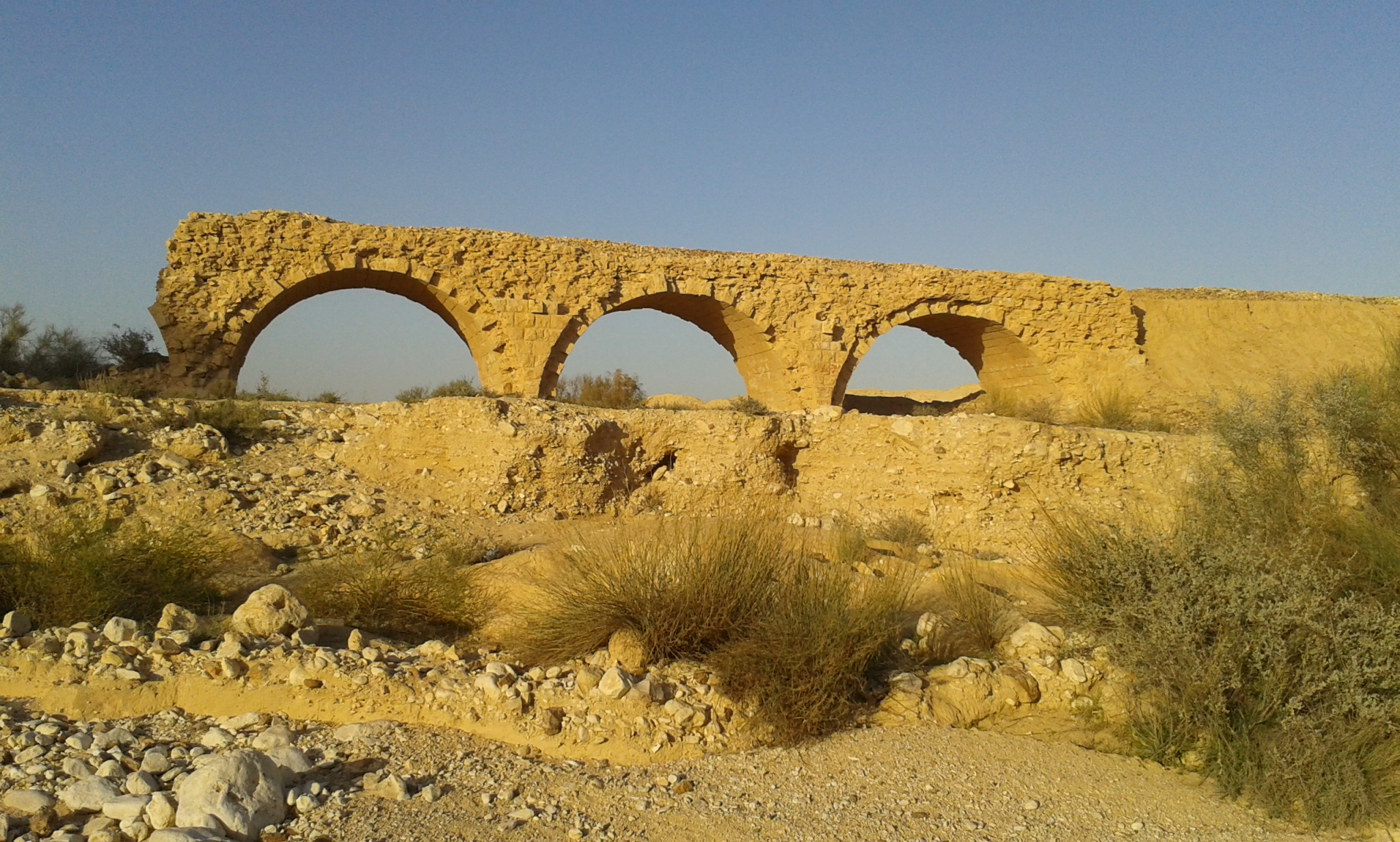 נחל לבן - גשר הרכבת הטורקי